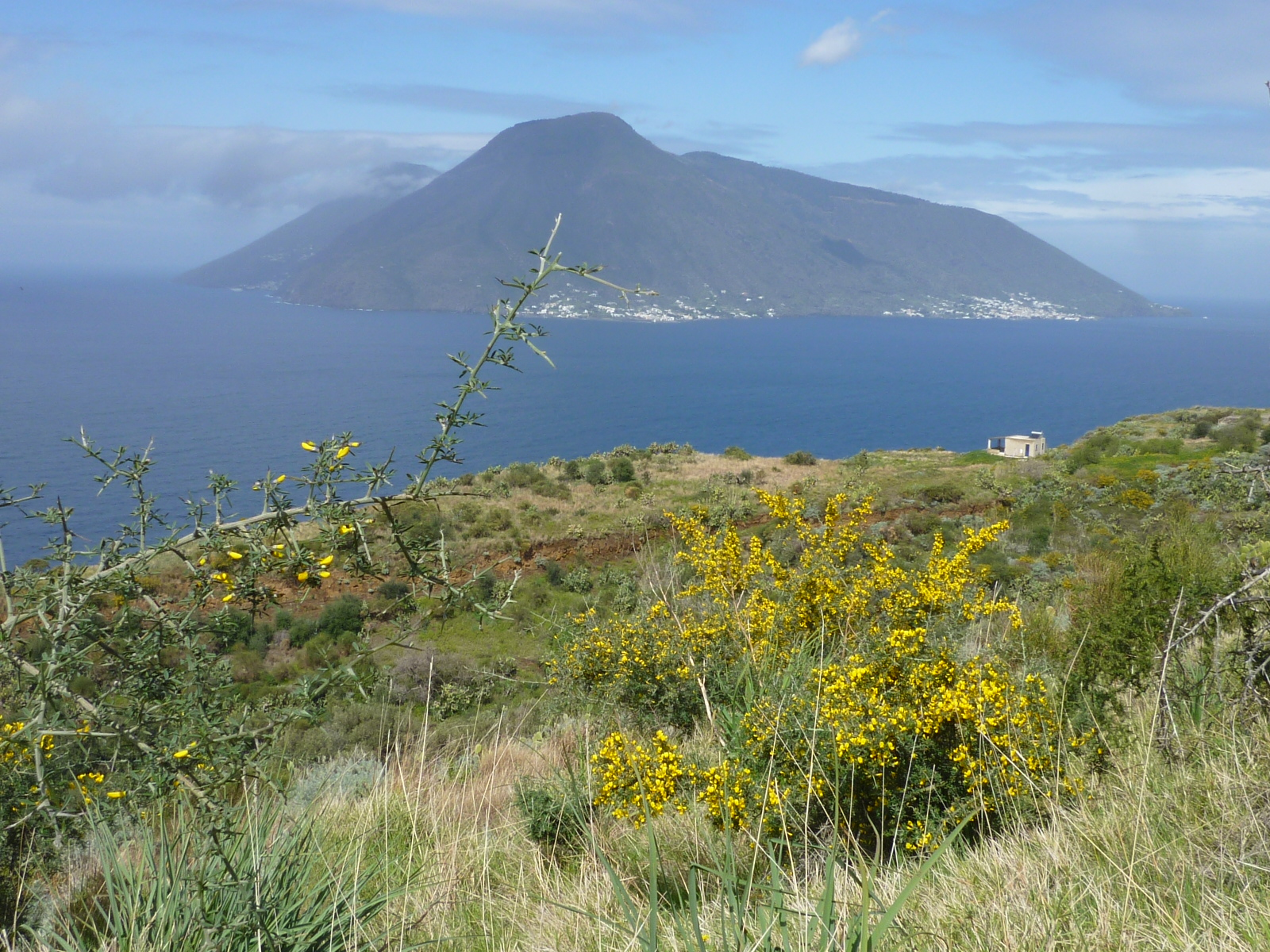 Blick von der Küste Lipari auf die Inseln Salina (Vordergrund) und Stromboli (Hintergrund)